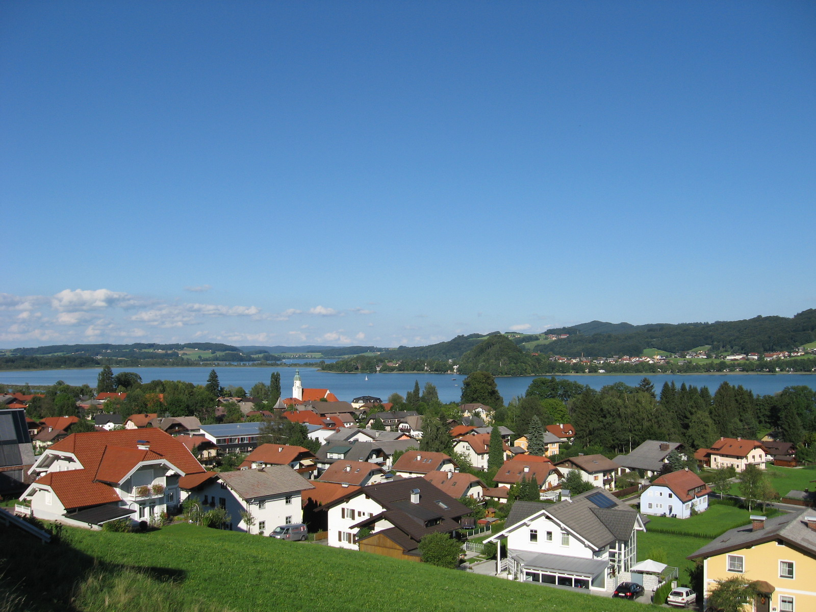 Seeham, Salzburger Land